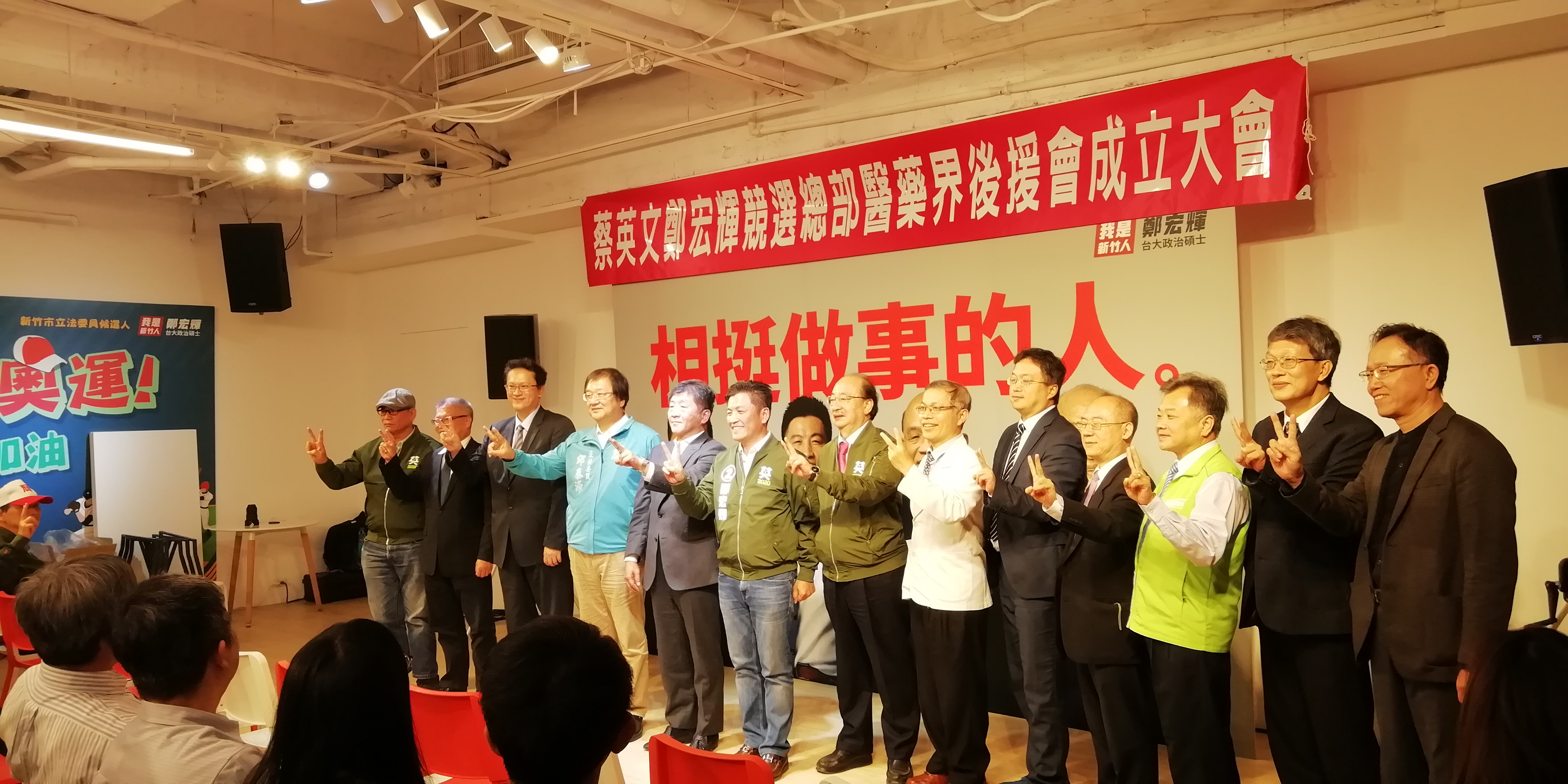 中文（台灣）: 蔡英文鄭宏輝競選總部醫藥界後援會成立大會